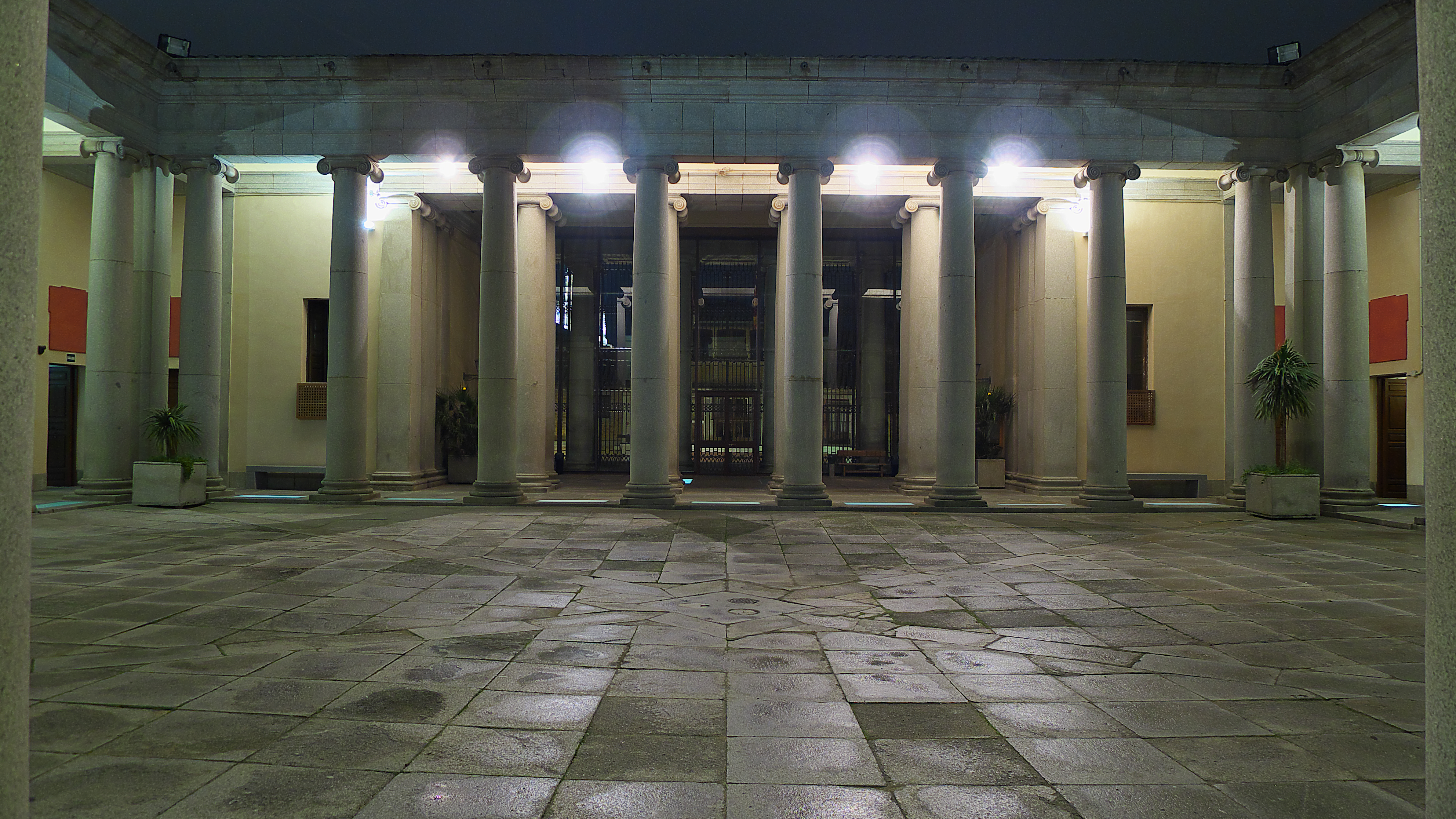 Ignacio Haan (1795), arquitecto del cardenal Francisco de Lorenzana, replantea el Colegio de Santa Catalina.